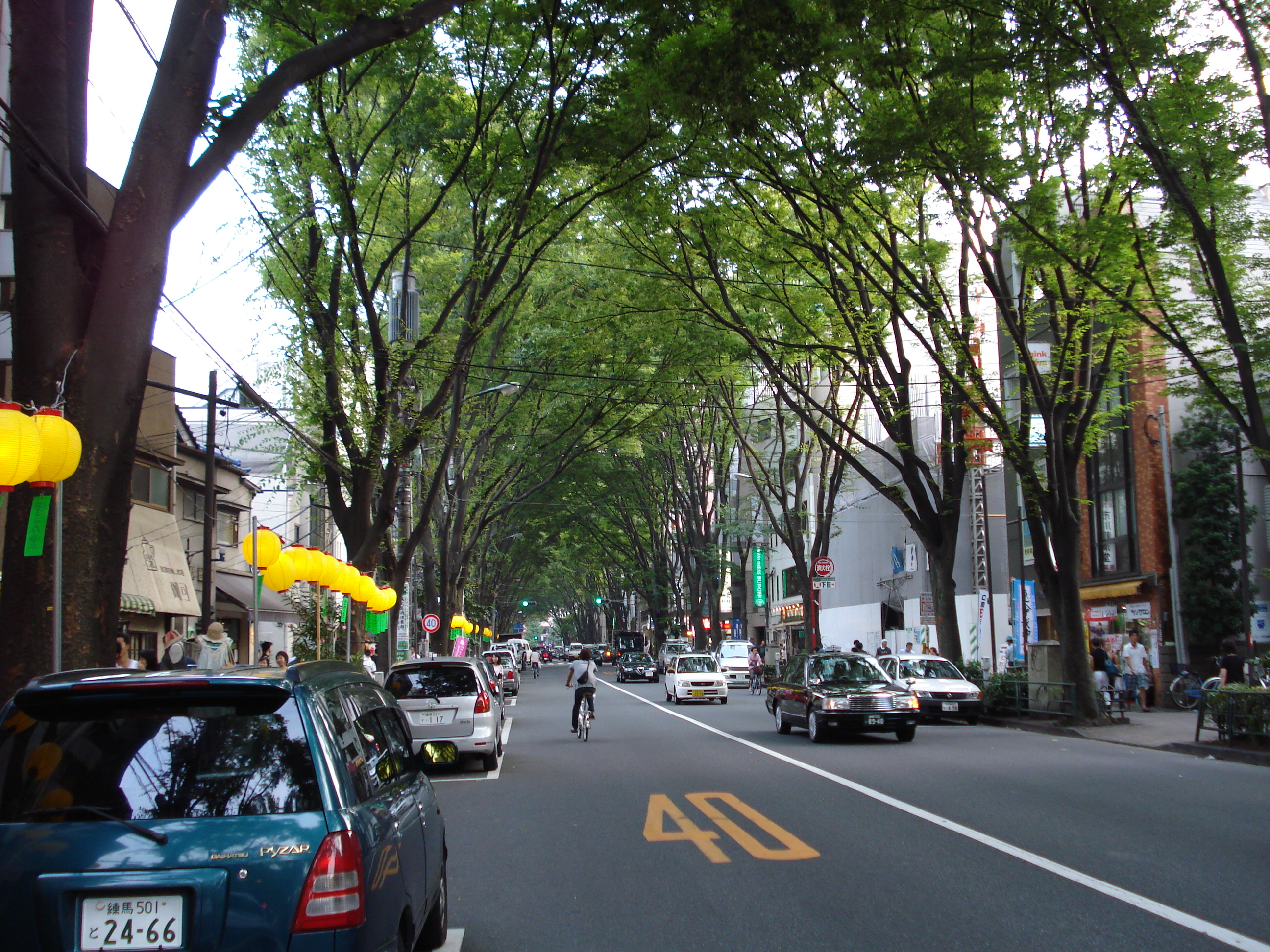 asagaya